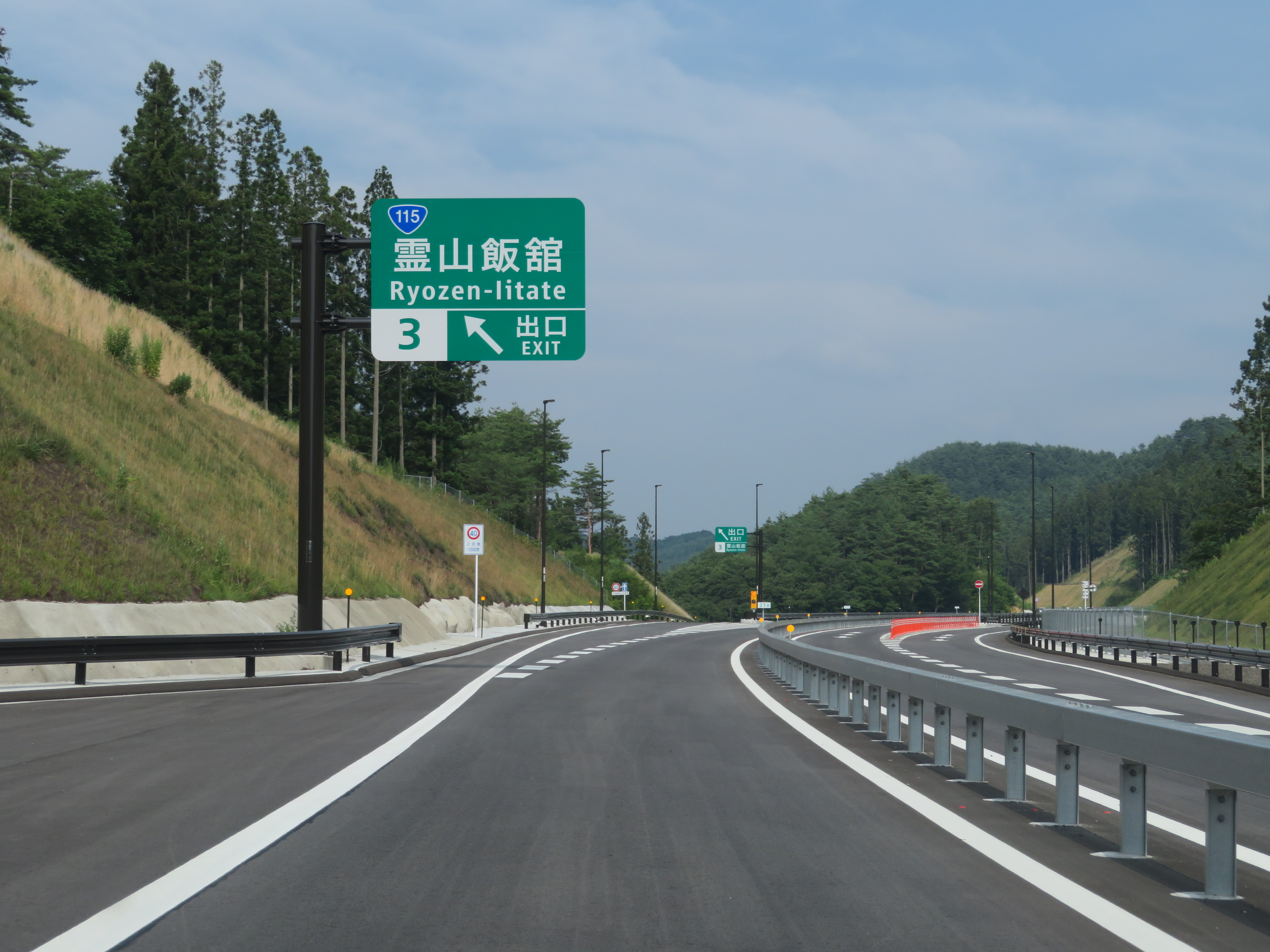 東北中央自動車道（相馬福島道路）霊山飯舘インターチェンジ（出口付近） Canon PowerShot SX720 HS